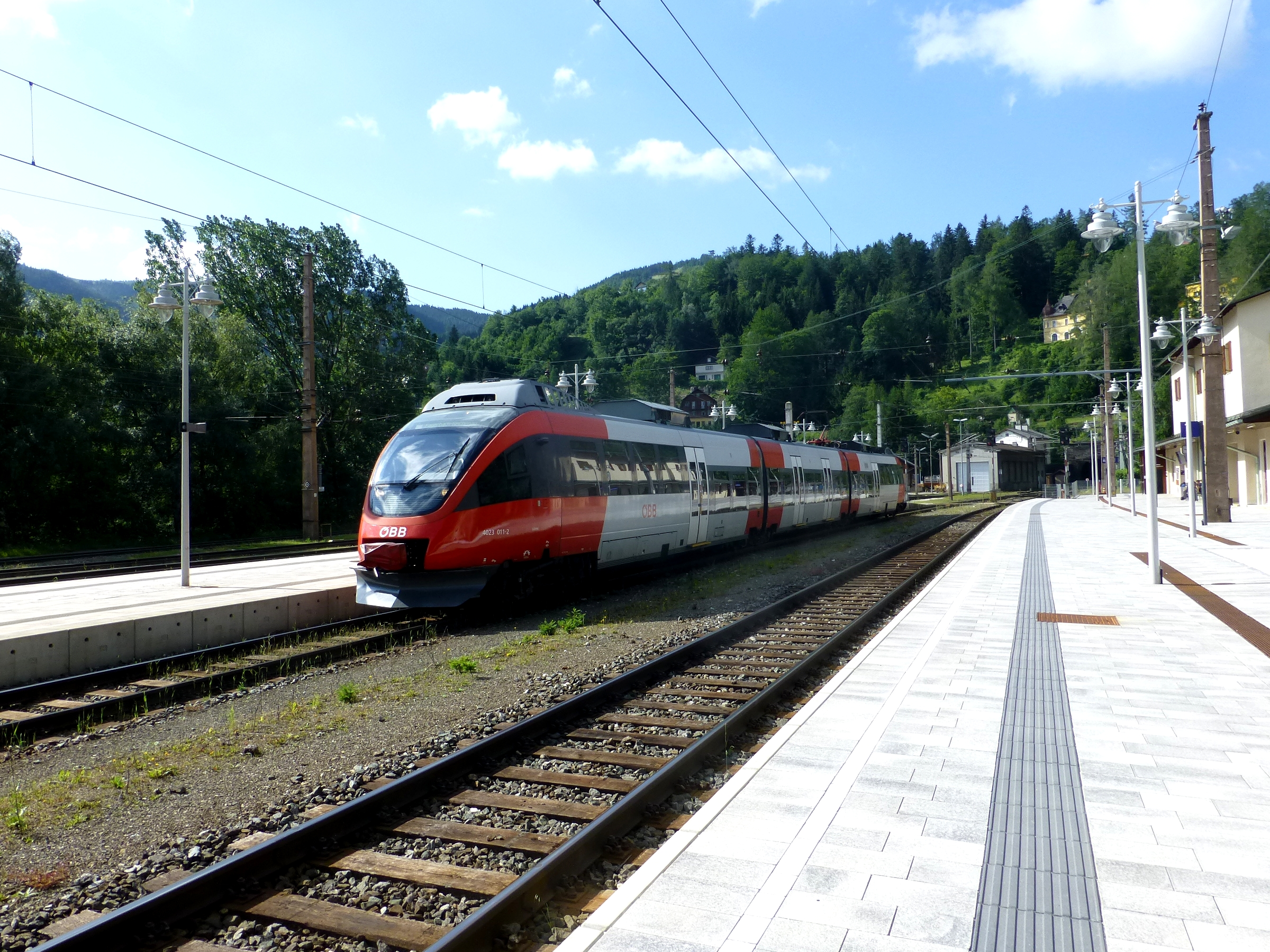 Bahnhof Semmering Semmeringbahn Austria